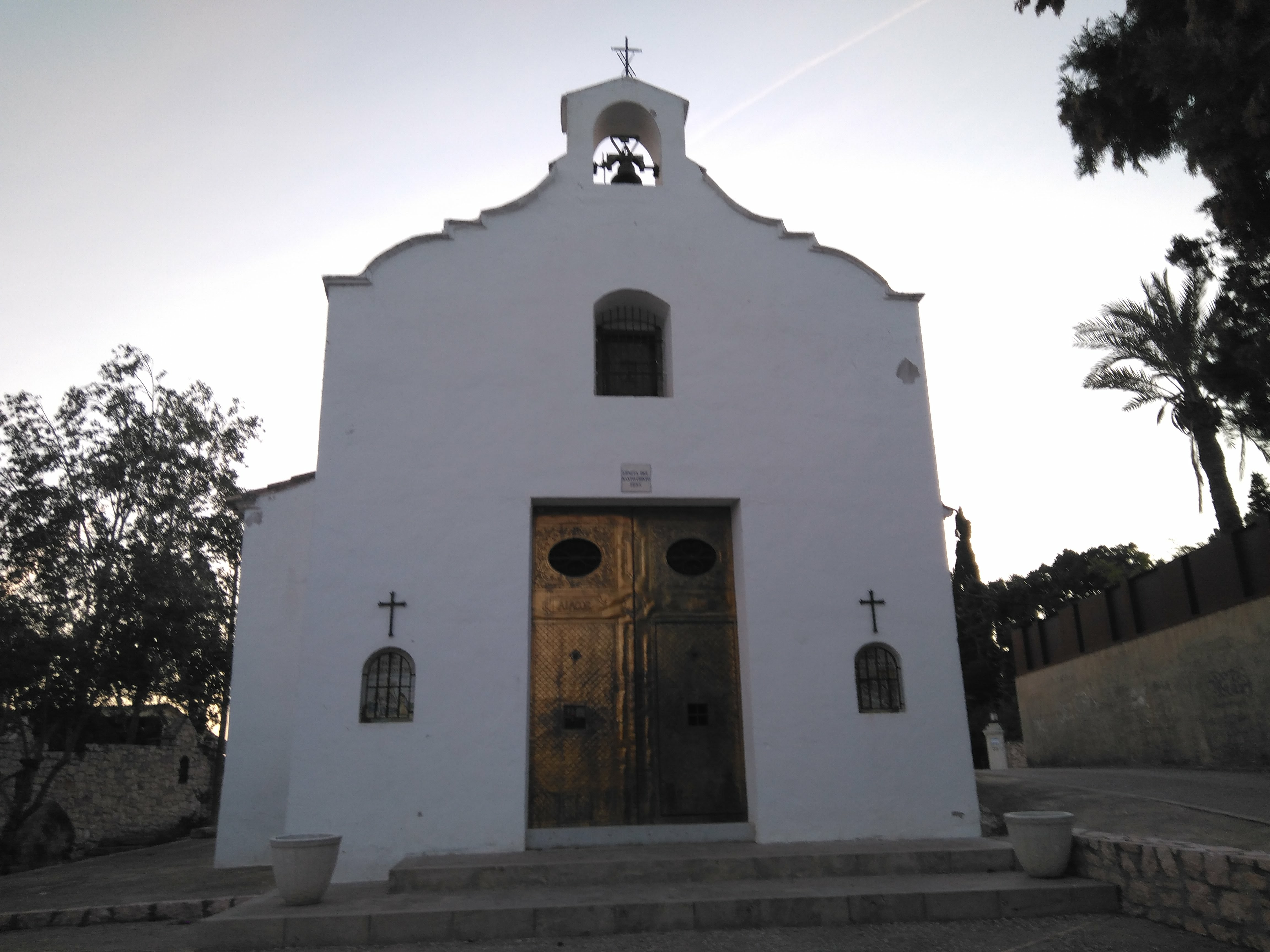 Ermita del Crist del Calvari (Aiacor) 23.081-013.